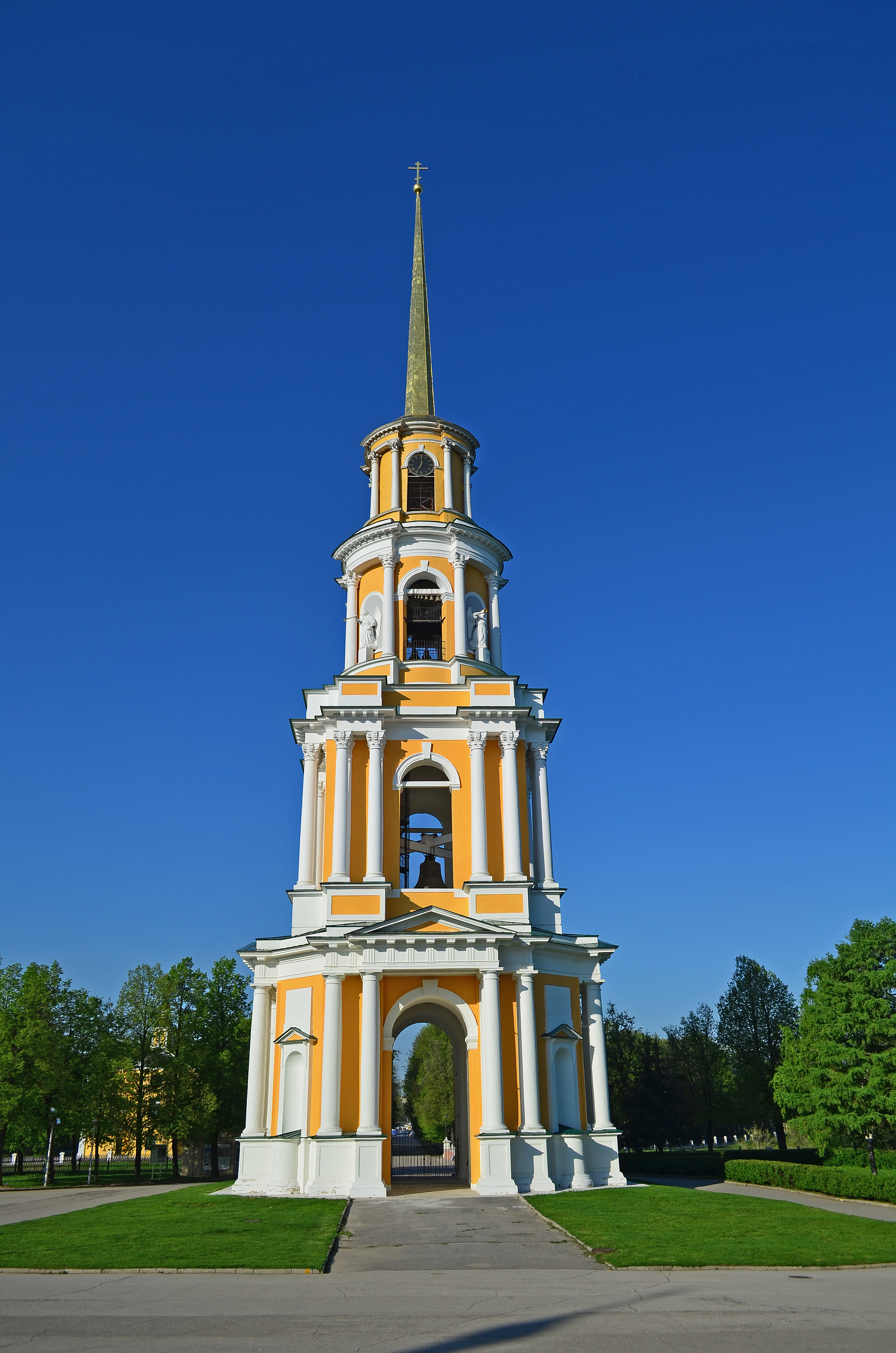 Рязань.Кремль.Колокольня Успенского собора.18-19 вв.